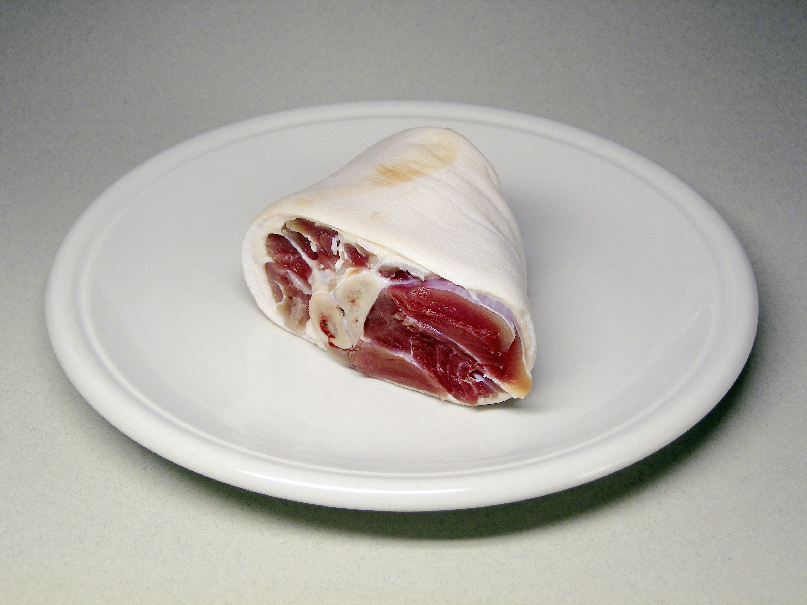 Gepökeltes Eisbein, roh. Eigene Aufnahme